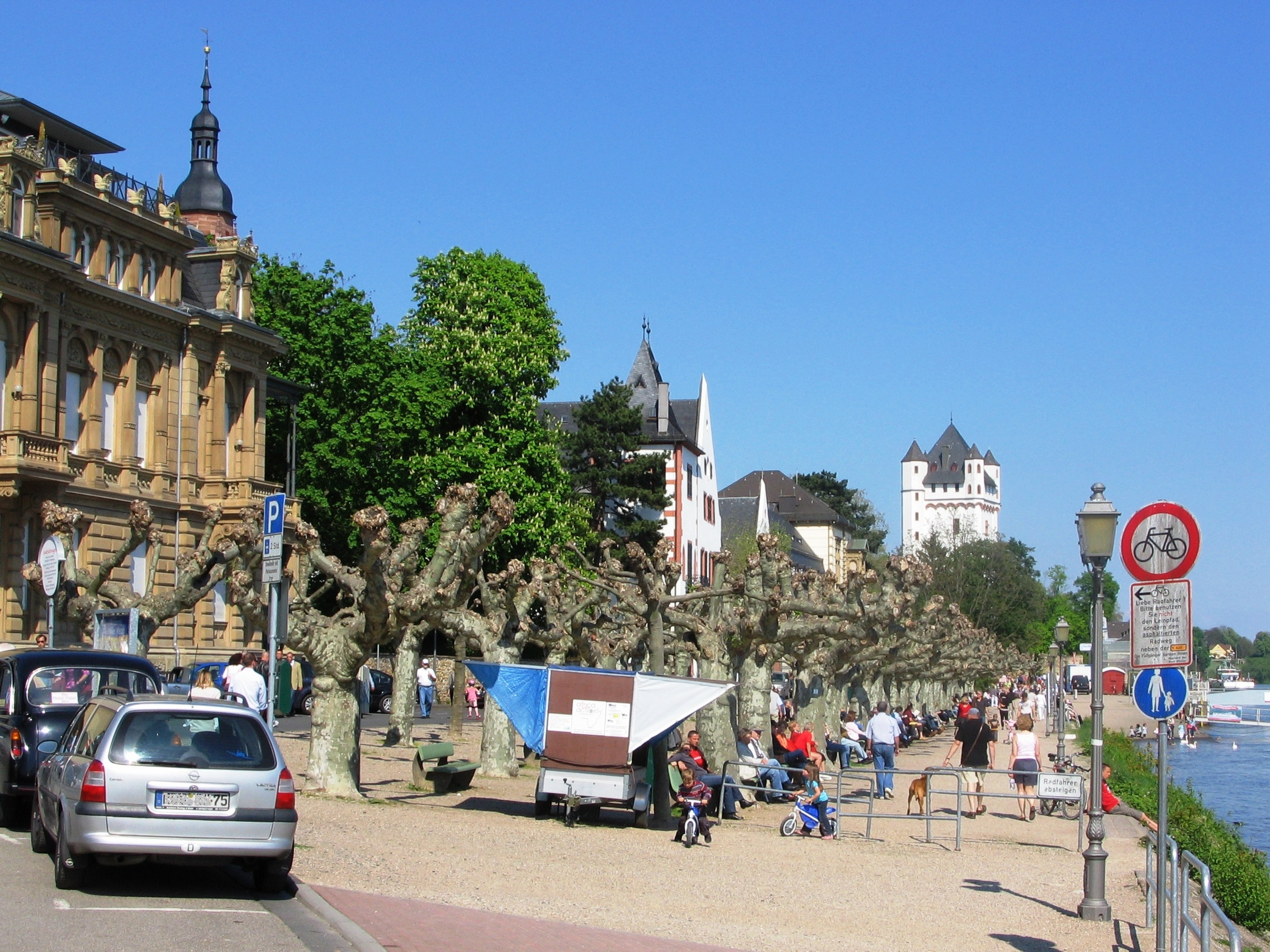 Platz von Montrichard, Rheinuferpromenade und Platanenallee in Eltville, Blick von Südwesten; in der Bildmitte der Eltzer Hof, weiter hinten der Turm der kurfürstlichen Burg